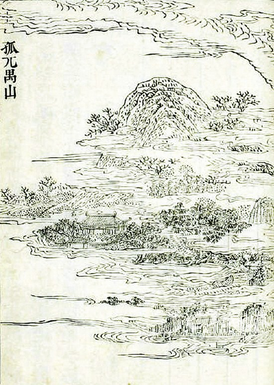 清朝乾隆年间“羊城八景”之一“孤兀禺山”木刻画，出自仇巨川所著《羊城古钞》